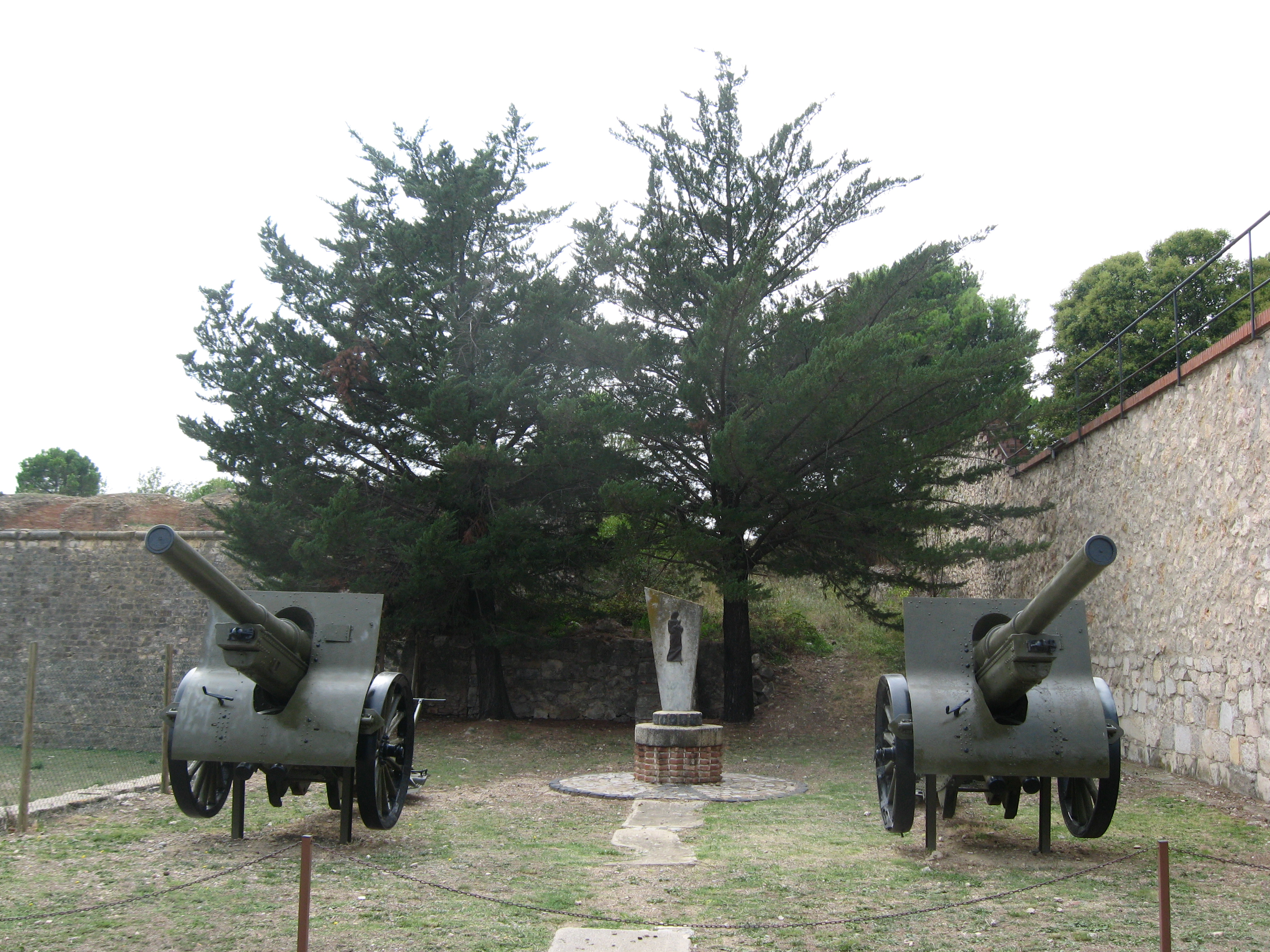 Gedenkstein an Sant Ferran (König Ferdinand, der Heilige) (Figueres/Katalonien) Datum: 16.09.2010 Urheber: Michael Pfeiffer alias Benutzer:Gordito1869 Quelle: privates Fotoarchiv des Urhebers